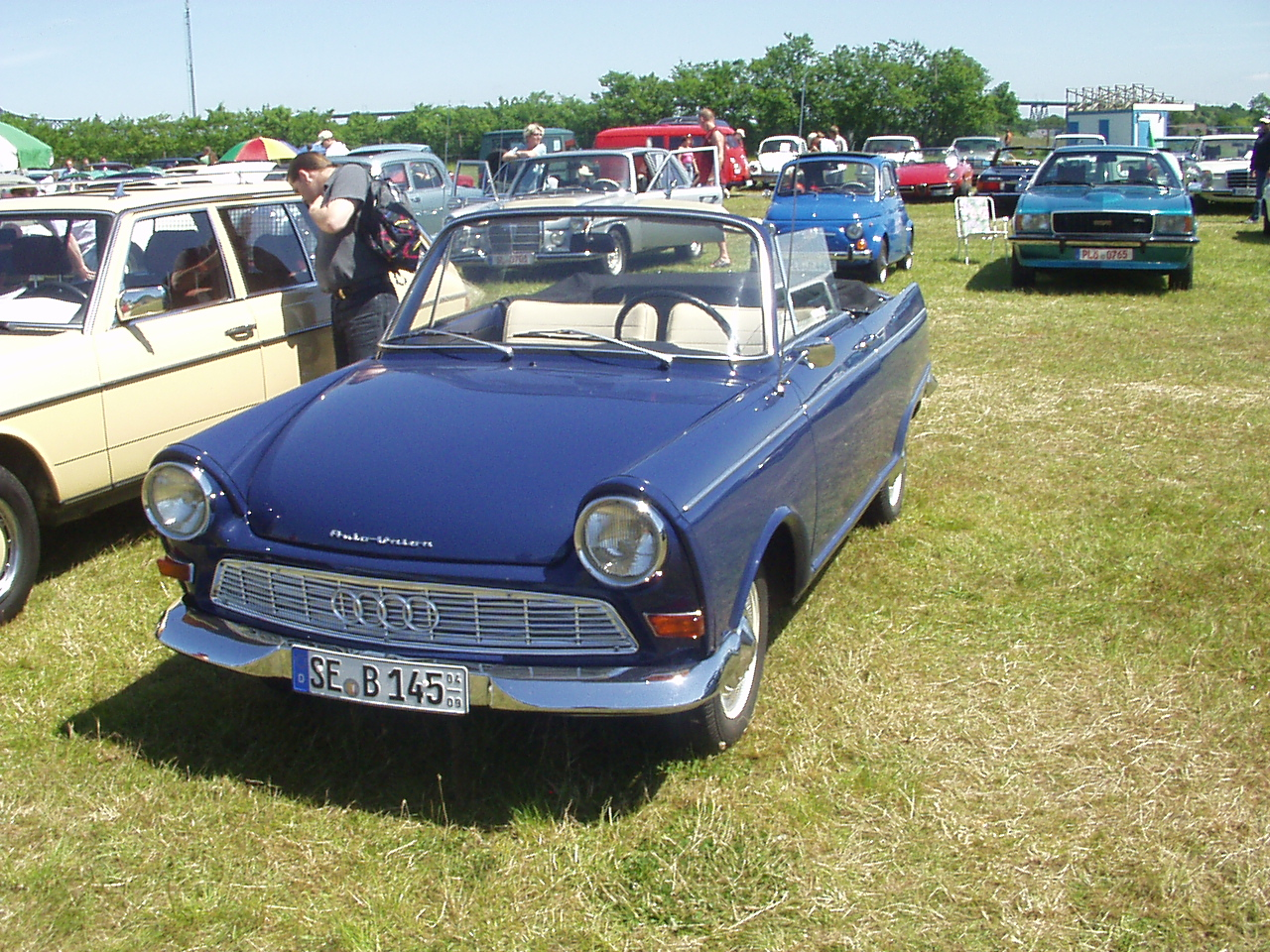 DKW F12 Roadster offen